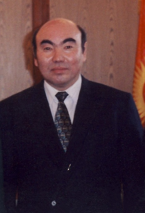 Частный визит профессора Л.Левитина в Кыргызстан по приглашению Президента Республики Аскара Акаева